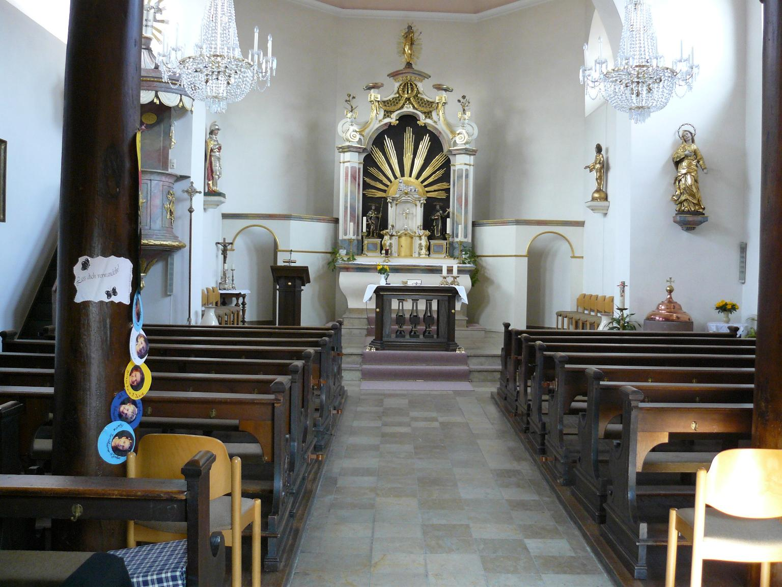 Innenraum der Kirche St. Achatius in Mainz-Bretzenheim (Zahlbach)